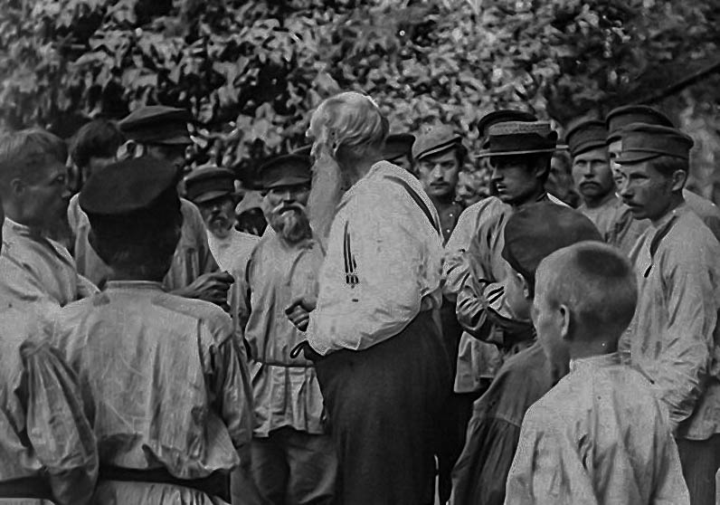 Лев Толстой среди крестьян